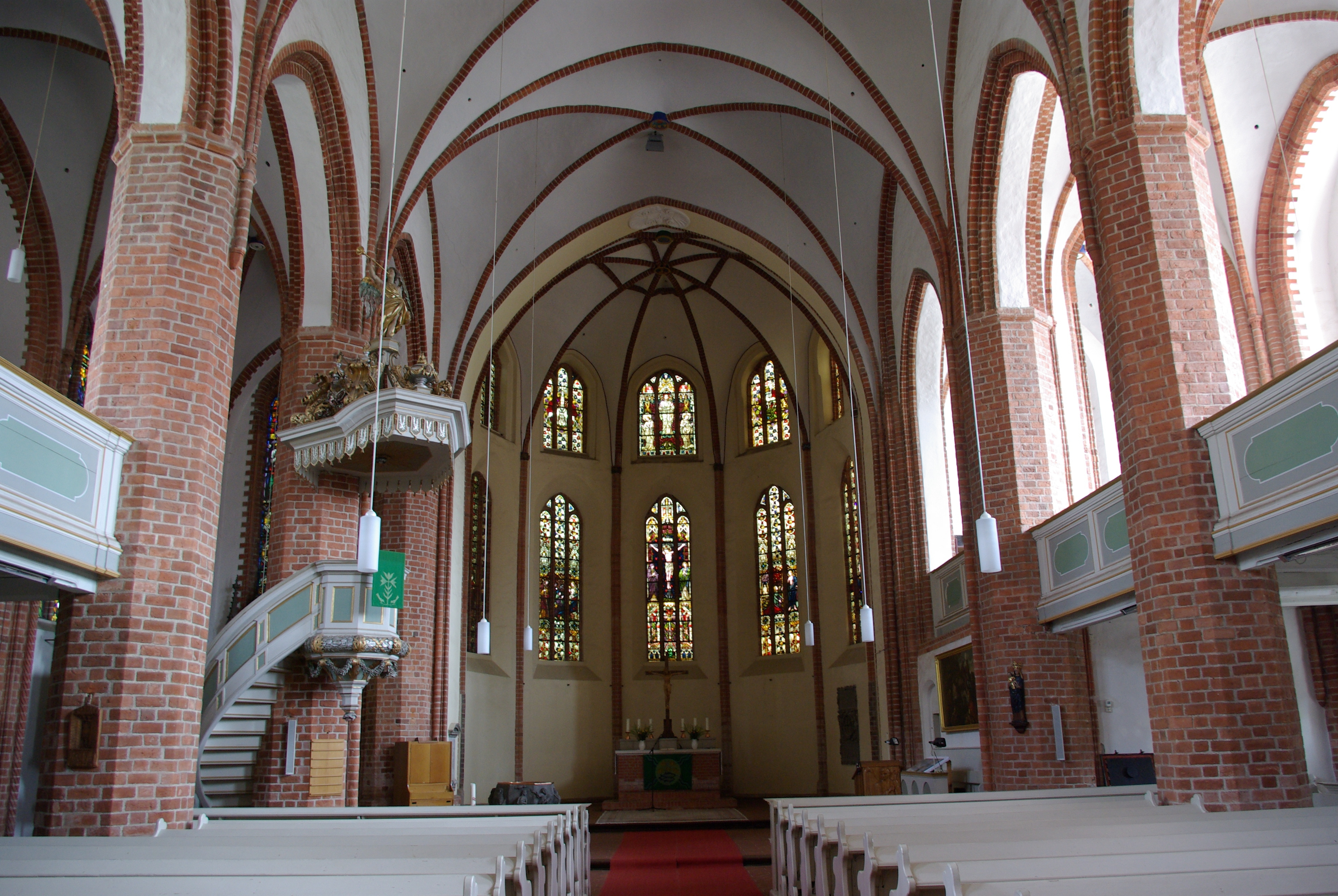 Kyritz in Brandenburg. Die Kirche entstand wahrscheinlich schon Ende des 13. Jh.s und wurde im 15. Jh. erweitert. Nach dem Stadtbrand wurde sie in den Jahren 1709–1712 wieder aufgebaut. Die Kirche ist denkmalgeschützt.